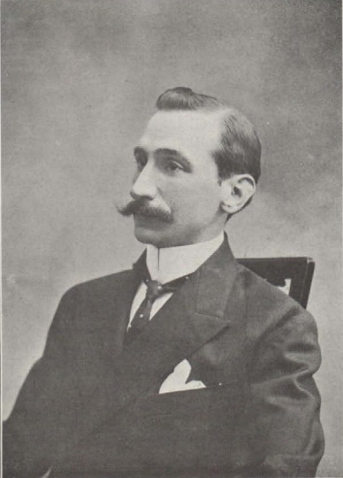 Fotografía del vizconde de Eza, Luis de Marichalar y Monreal.